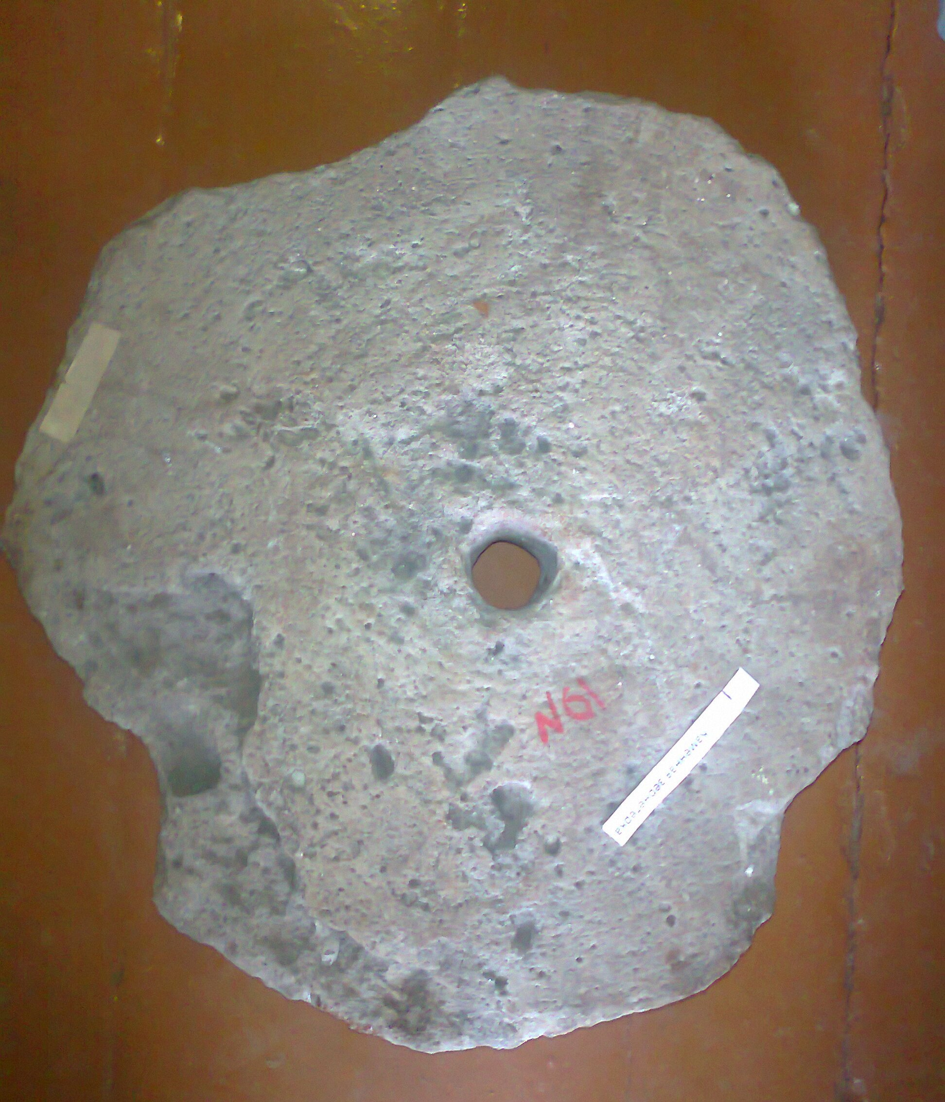 Зернетерка, найденная возле Орехово